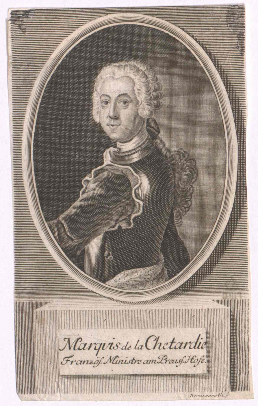 Trotti, Marquis de La Chétardie, Jacques-Joachim (1705 - 1758)